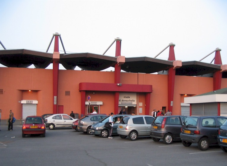 Vue de l'entrée principale du Stade Dominique Duvauchelle à Créteil (Val-de-Marne)